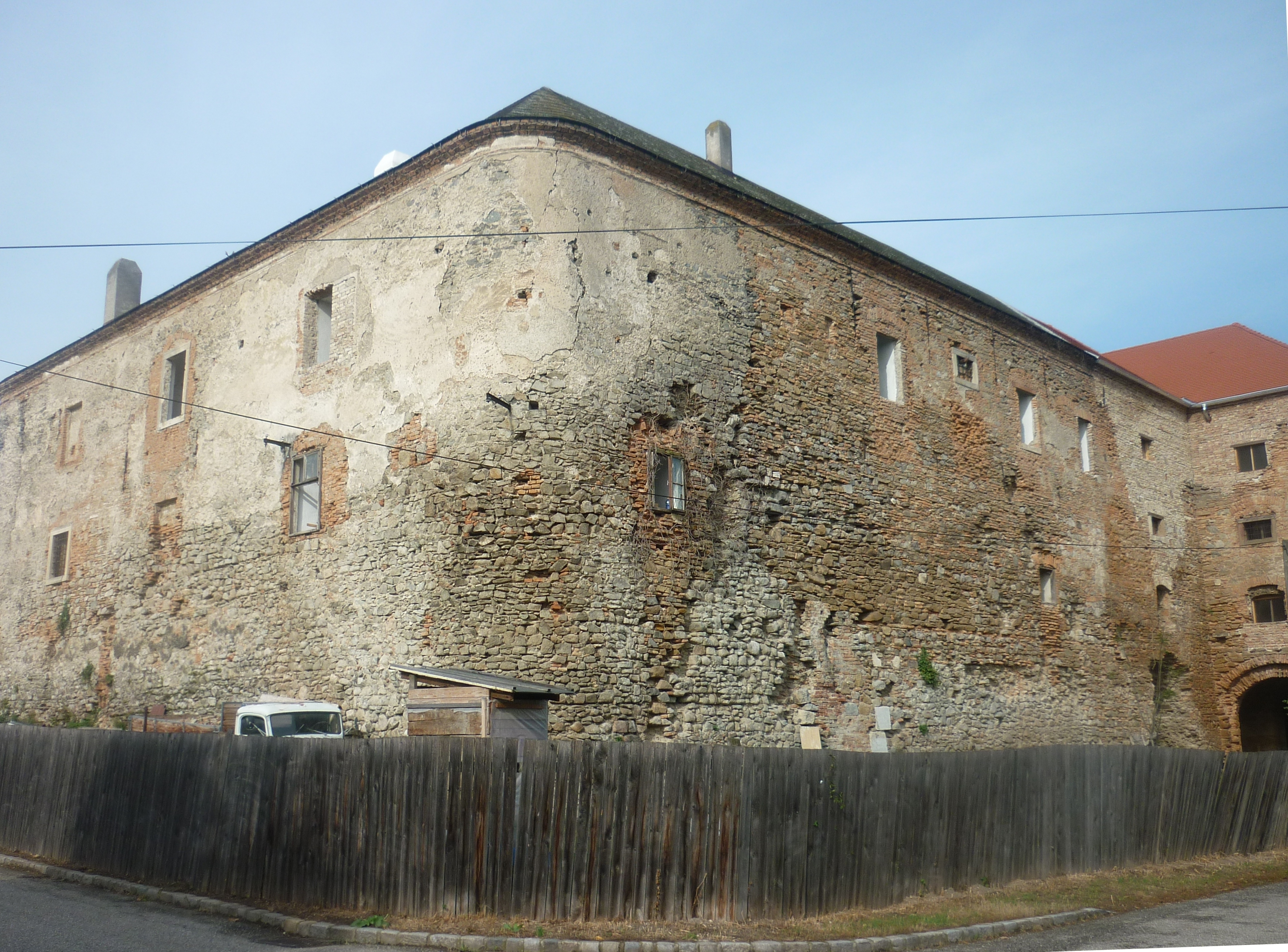 Kittsee - Altes Schloss Dieses Bild wurde anlässlich des österreichischen Tags des Denkmals 2012 im Burgenland eingereicht.